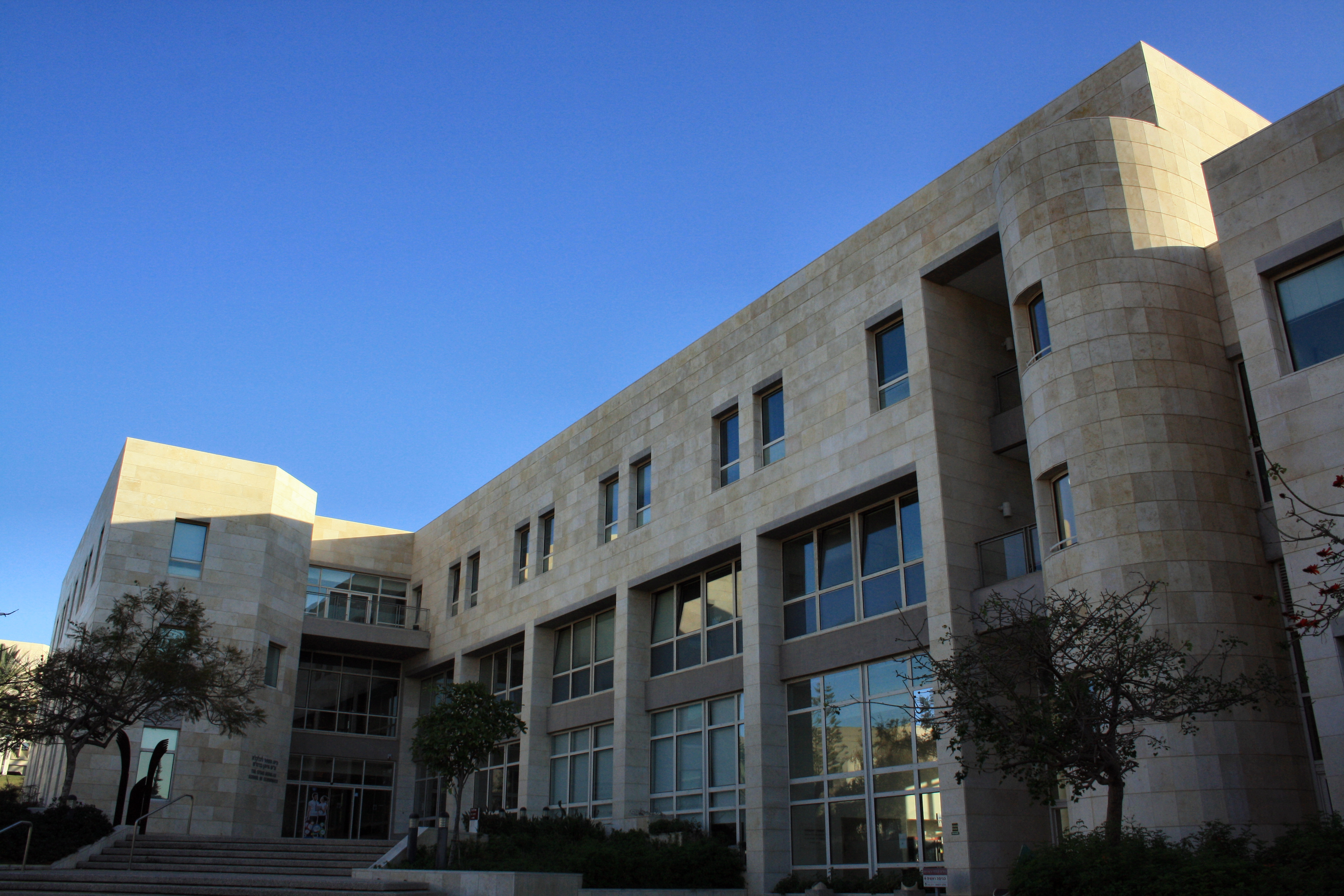 בניין בית הספר לכלכלה באוניברסיטת ת"א